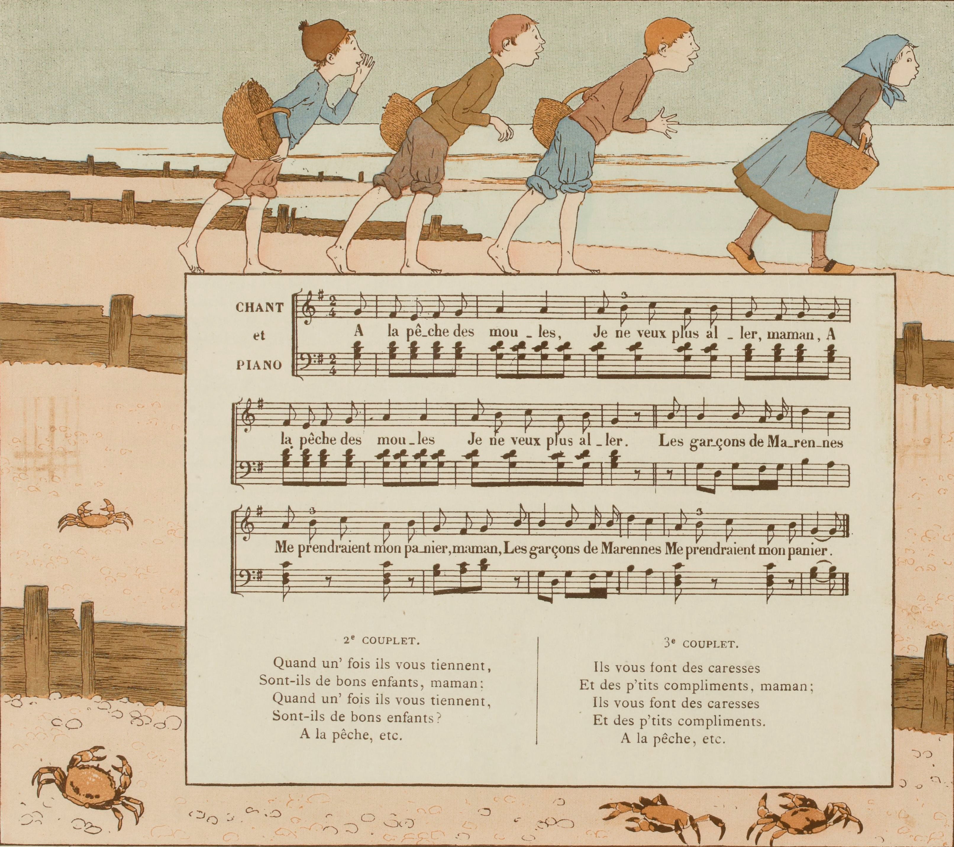 Partition et dessins tirés d'un recueil de chansons enfantines du XIXe siècle. Une petite fille ne souhaite plus retourner à la pêche aux moules à cause du comportement insistant des garçons.